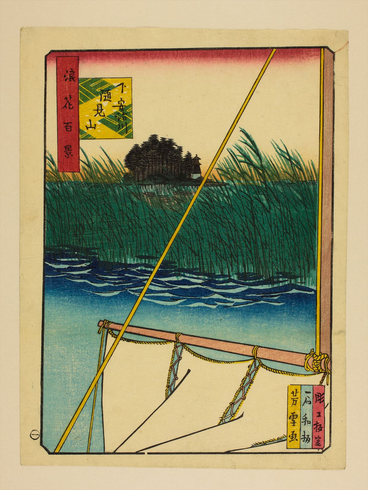 1800年代。南粋亭芳雪/画。浪花百景 102枚のうちの1枚。大阪市立中央図書館蔵。